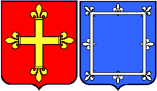 Croix et Orle fleurdelys. Blason. Dessin perso. GFDL.